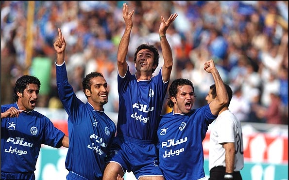 استقلال برق شیراز ورزشگاه آزادی تهران قهرمانی لیگ برتر